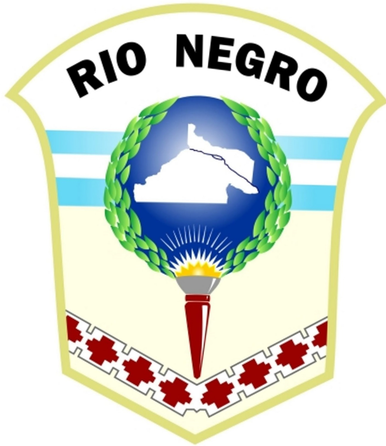 Coat of arms of Río Negro Province, Argentina.